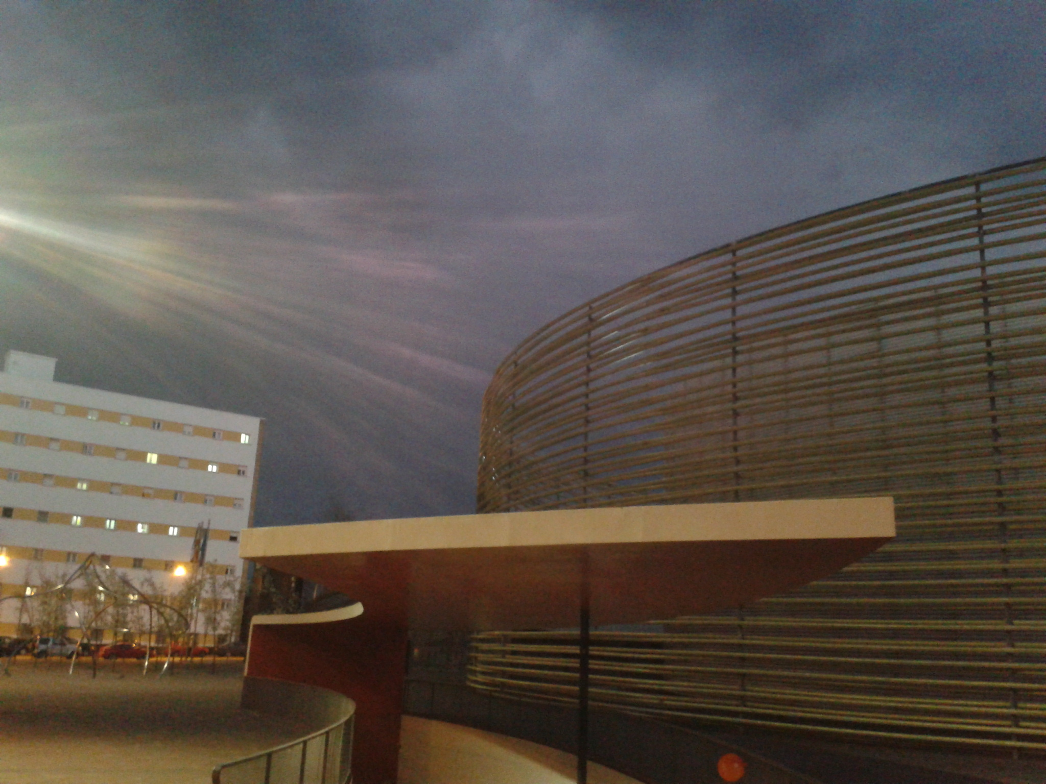 Badajoz